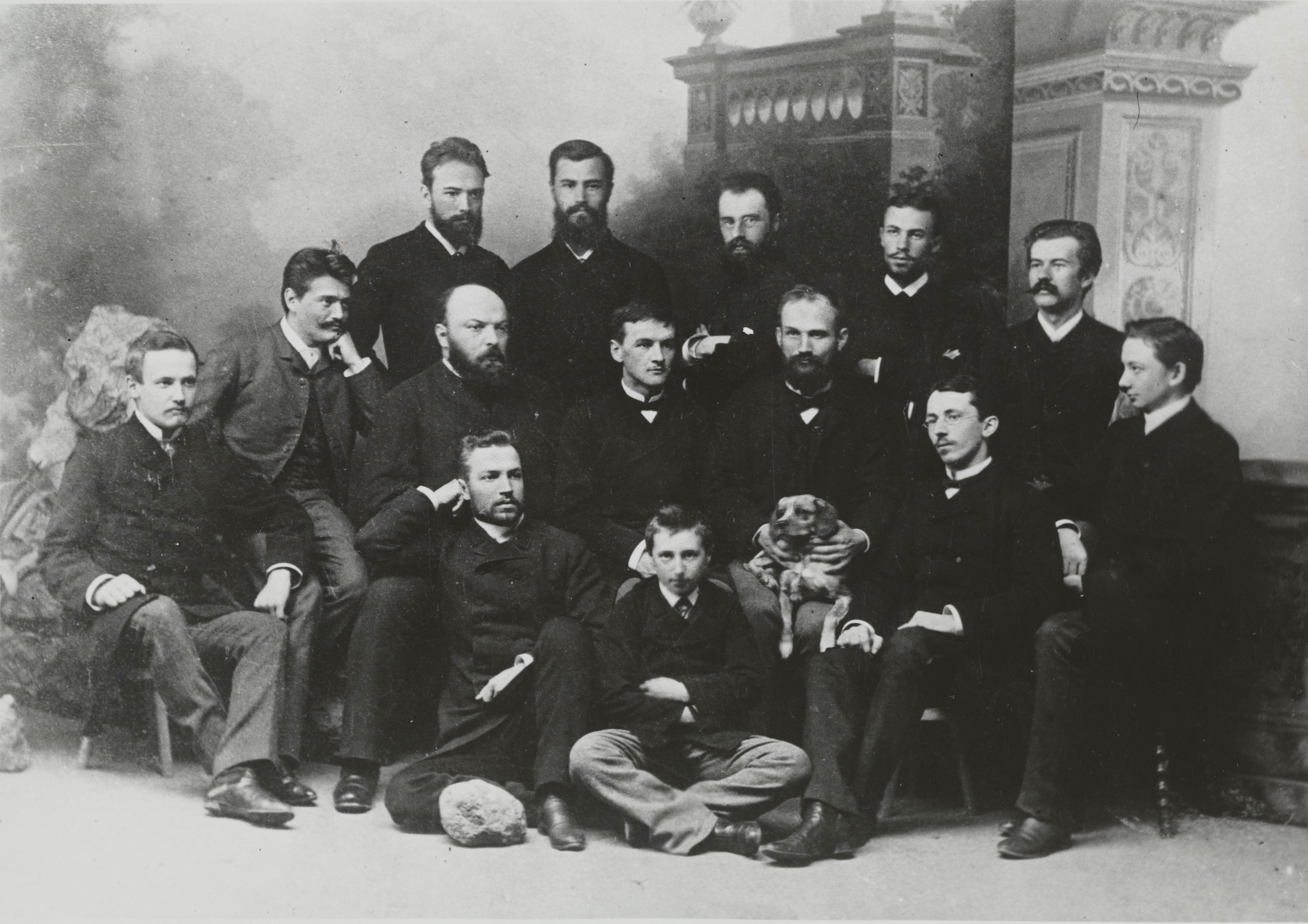 Zdjęcie grupowe mężczyzn, Dorpat (Tartu), 17 października 1886 r. Siedzą na podłodze: Bronisław Kader, Józef Zaleski. Siedzą na krzesłach od lewej: Jan Cumft, Bohdan Wydżga, Stanisław Krysiński, Aleksander Aleksandrow, Jan Baudouin de Courtenay (z psem), Stanisław Thugutt, A. Śmiechowski. Stoją od lewej: Aleksander Baudouin de Courtenay, Michał Jastrzębski, Stanisław Szczepan Zaleski, Aleksander Gzowski, Wincenty Pruszyński.